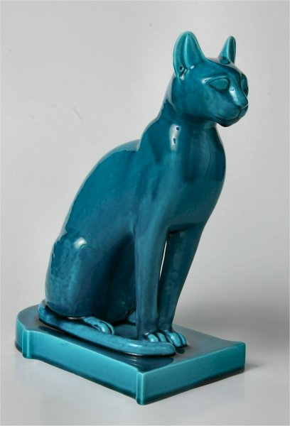 Œuvre réalisée par Théodore Deck et exposée au Musée Théodore Deck de Guebwiller